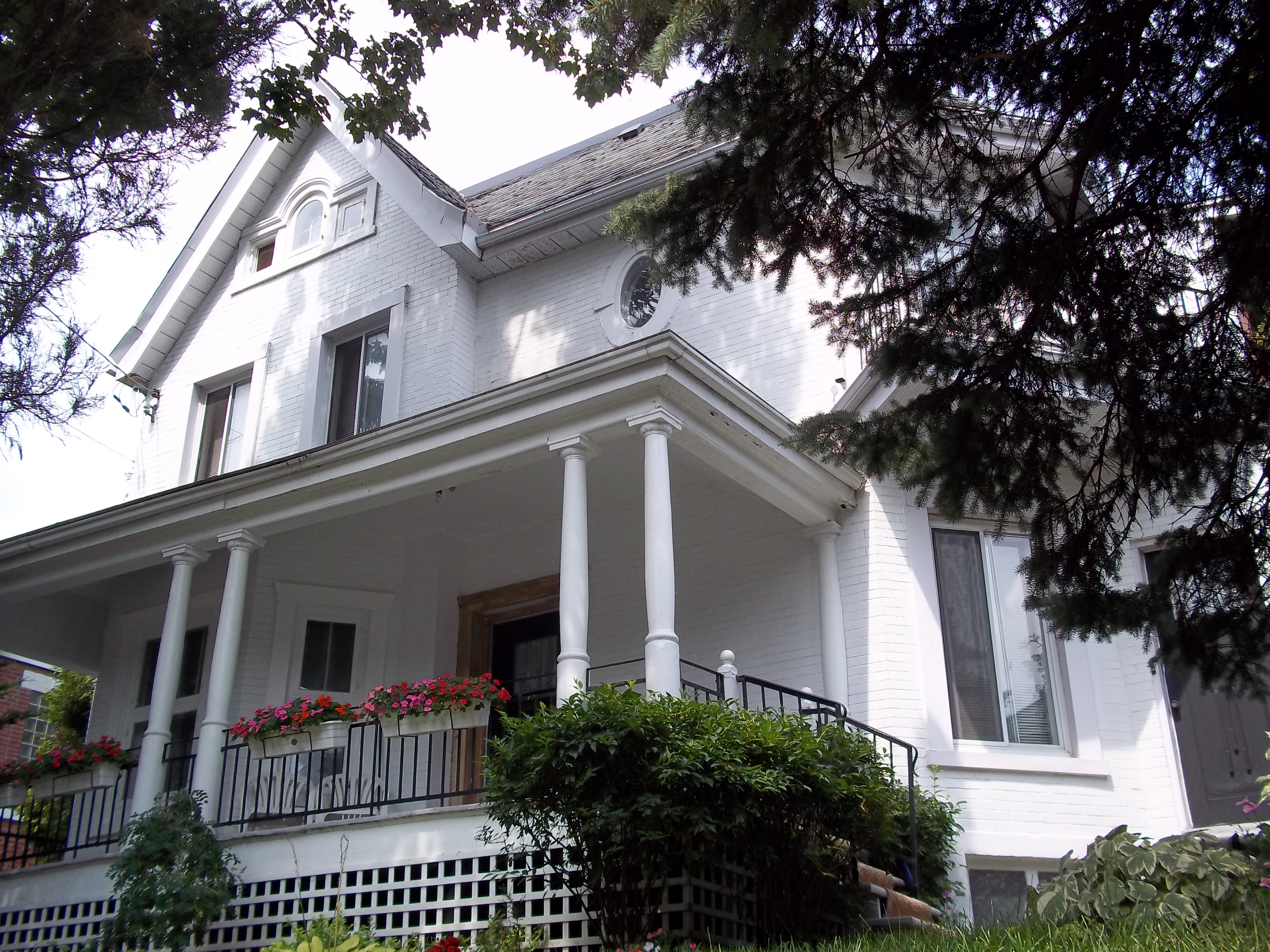 Résidences du 33-35 rue Alepin, LaSalle, Montréal